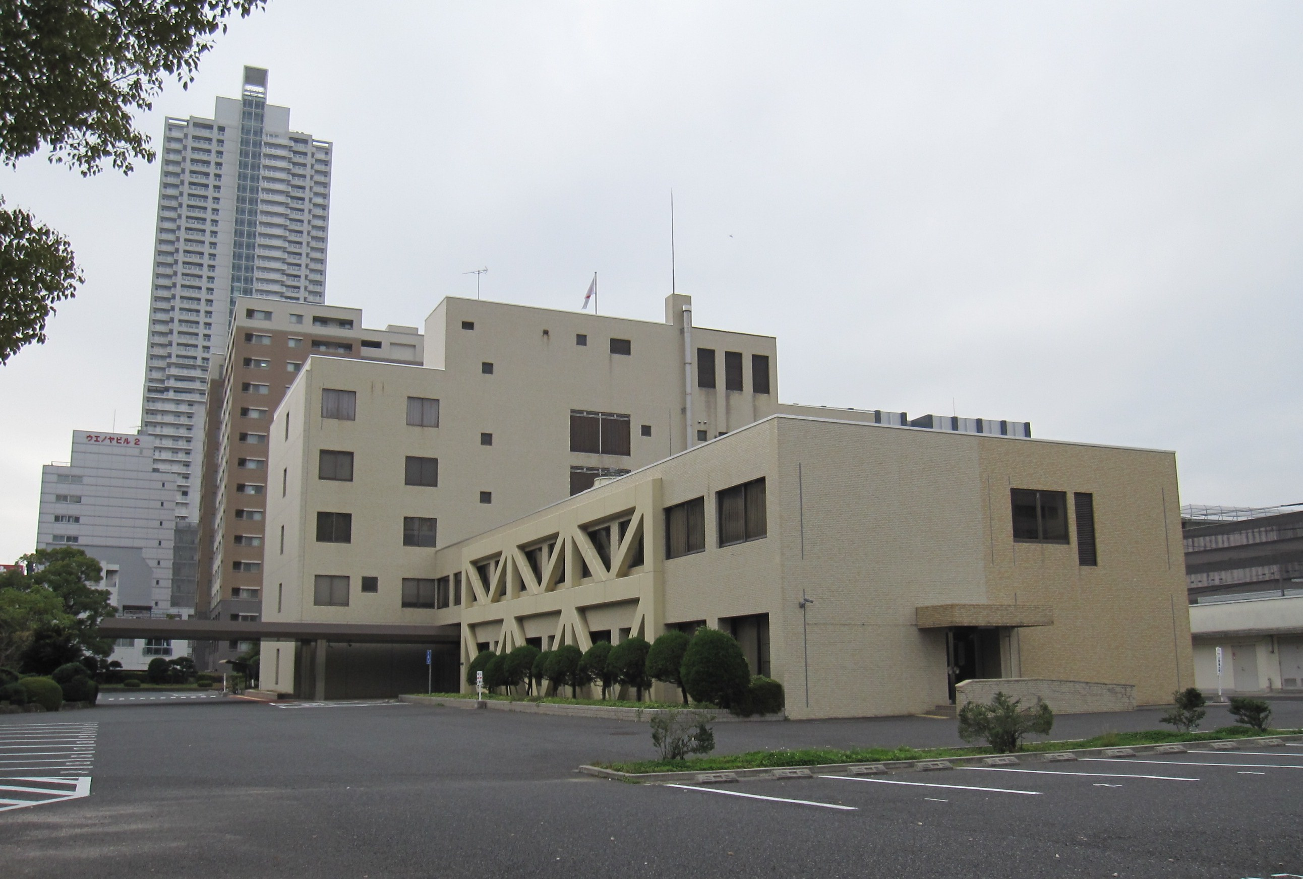 広島家庭裁判所